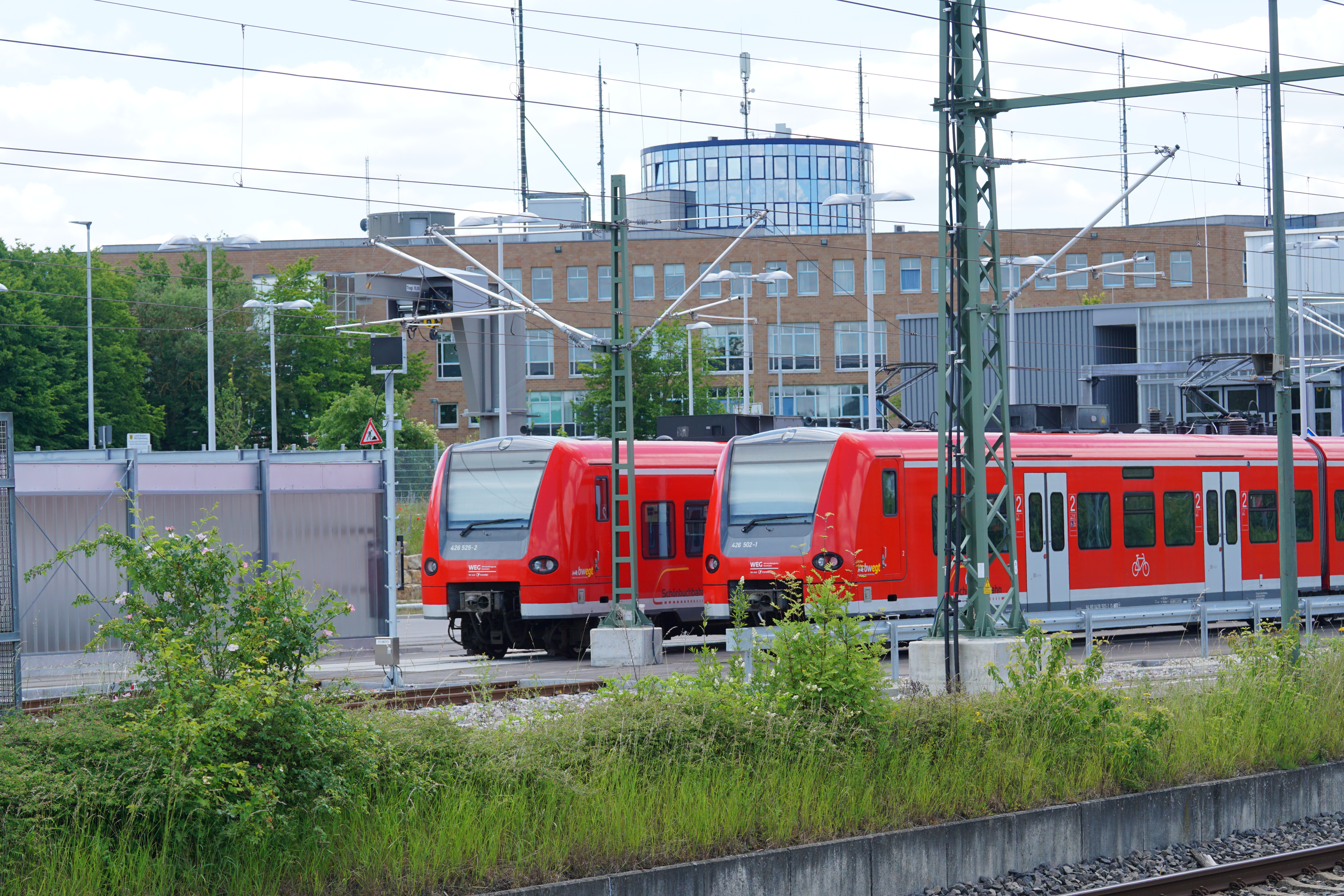 Bahnhof Böblingen. Die Fahrzeuge 425-502 und 425-525 im Betrieb der Schönbuchbahn (WEG) vor dem Betriebswerk Böblingen. Diese Leihfahrzeuge in der Lackierung der DB wurden mit dem Logo der Schönbuchbahn versehen und bleiben dort bis die bestellten Fahrzeuge geliefert werden. Im Hintergrund Polizeipräsidium Böblingen und dahinter das Treppengebäude von Calwerstraße 7